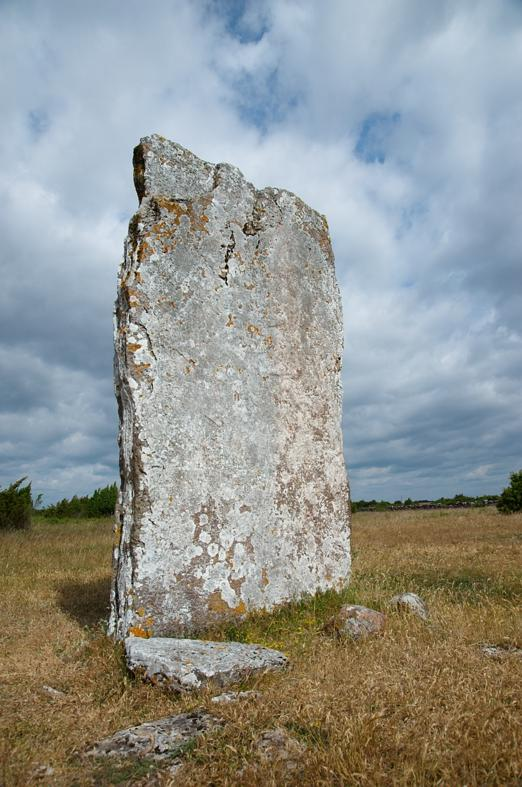 Kastlösa 45:1. Grav markerad av sten/block på Stora Alvaret från bronsålder/järnålder. Motiv: Kastlösa 45:1 Nyckelord: Riksintressen, Världsarv Kategori: Samlingsplats, Grav markerad av rest sten/block Kastlösa 45:1. Grav markerad av sten/block på Stora Alvaret från bronsålder/järnålder. Kastlösa 45:1.